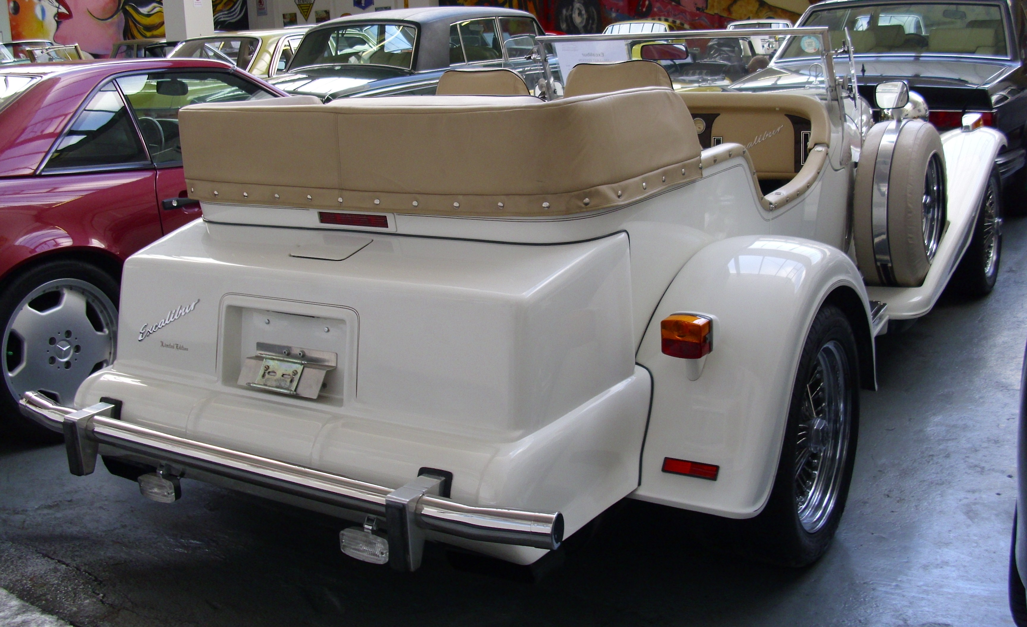 Excalibur Limited Edition 100 von 1994